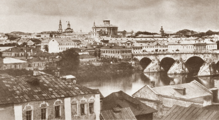 Старый Большой Каменный мост, около 1855-1857 года.